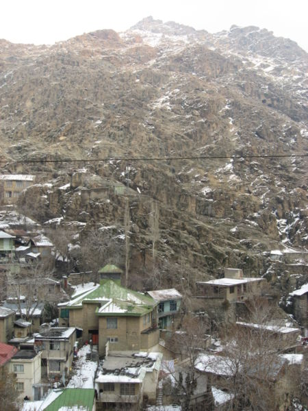 Darband en Hiver